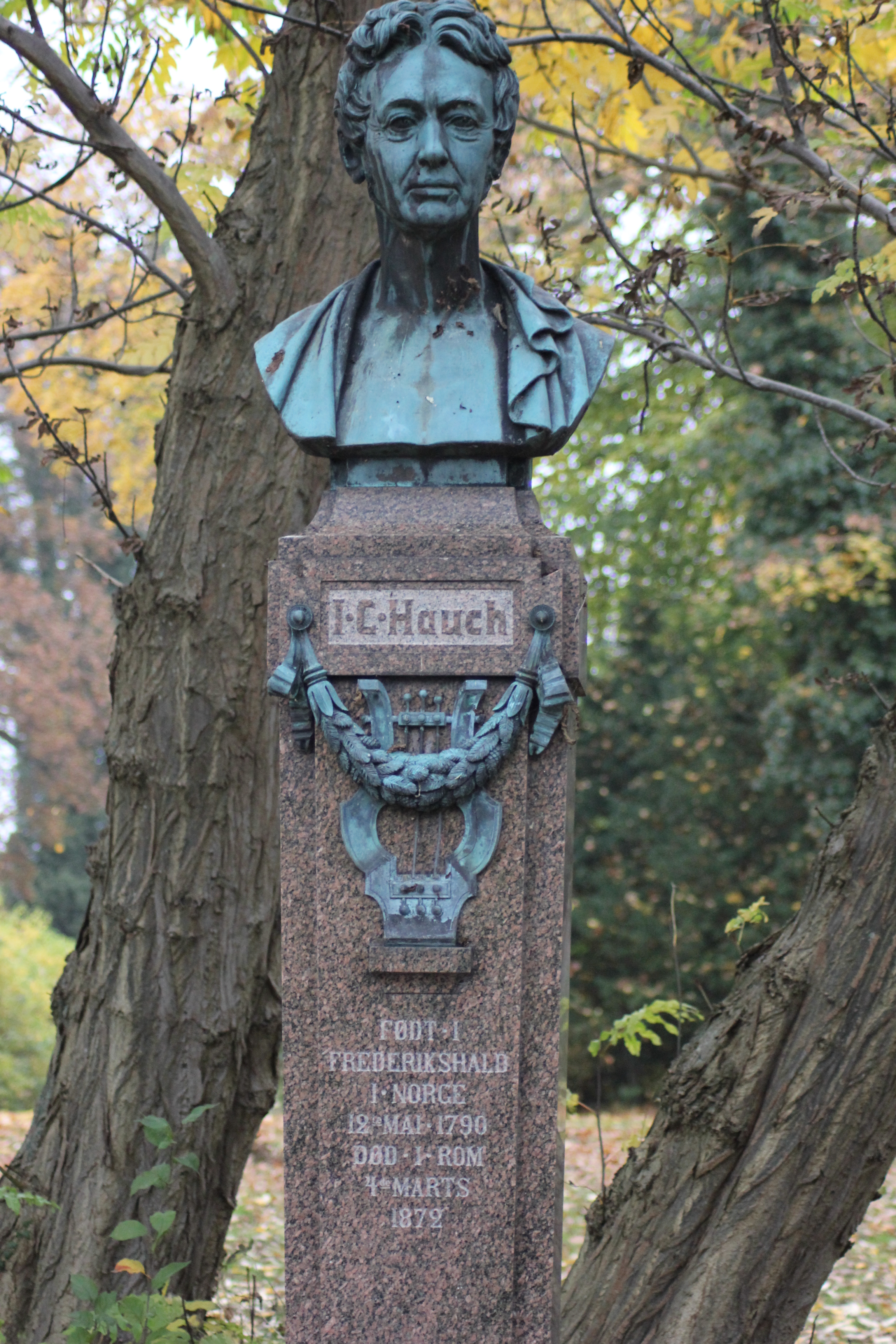 Buste for I.C.Hauch i Sorø Akademis park